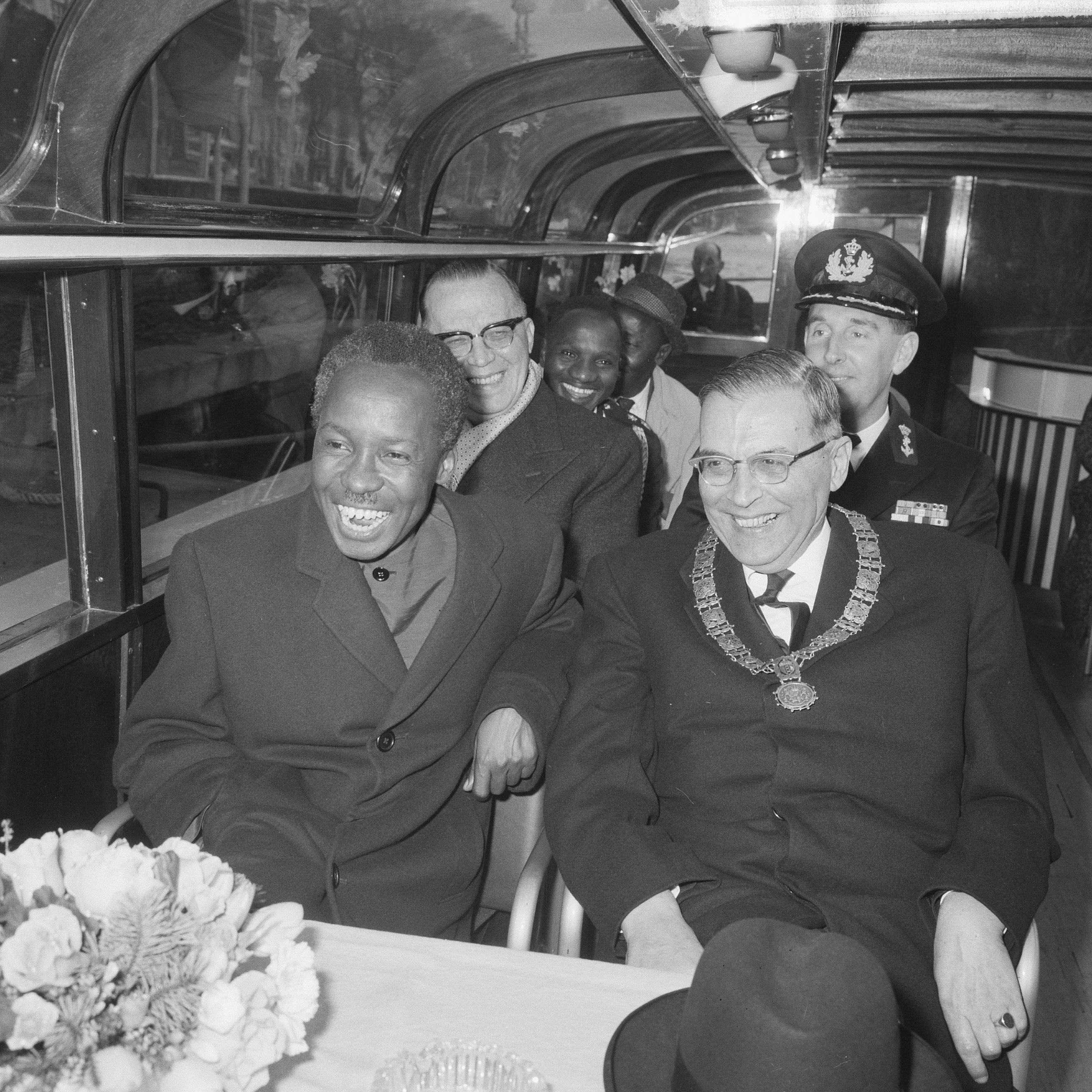 Collectie / Archief : Fotocollectie Anefo Reportage / Serie : [ onbekend ] Beschrijving : Staatsbezoek president Nyerere van Tanzania, president Nyerere maakte rondvaart door grachten, hier naast burgemeester Van Hall Datum : 21 april 1965 Locatie : Amsterdam, Noord-Holland Trefwoorden : burgemeesters, burgemeesters, rondvaarten, staatsbezoeken Persoonsnaam : Hall van, Nyerere, Julius Fotograaf : Nijs, Jac. de / Anefo Auteursrechthebbende : Nationaal Archief Materiaalsoort : Negatief (zwart/wit) Nummer archiefinventaris : bekijk toegang 2.24.01.03 Bestanddeelnummer : 917-6706